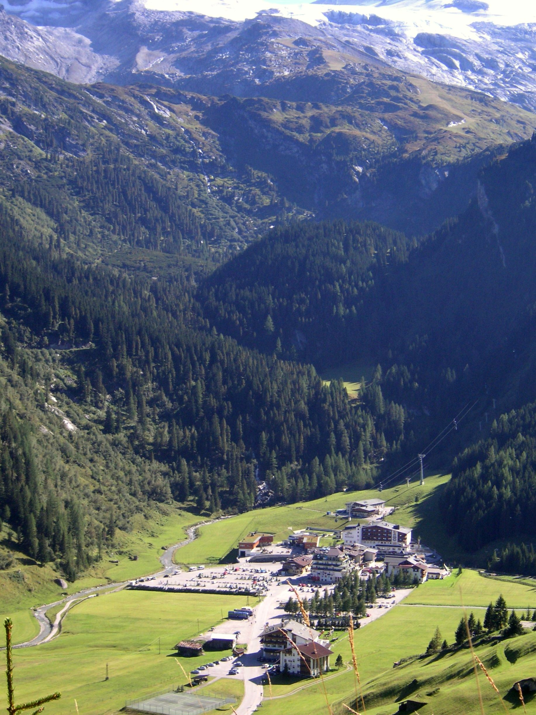 Hintertux, Zillertal, Österreich